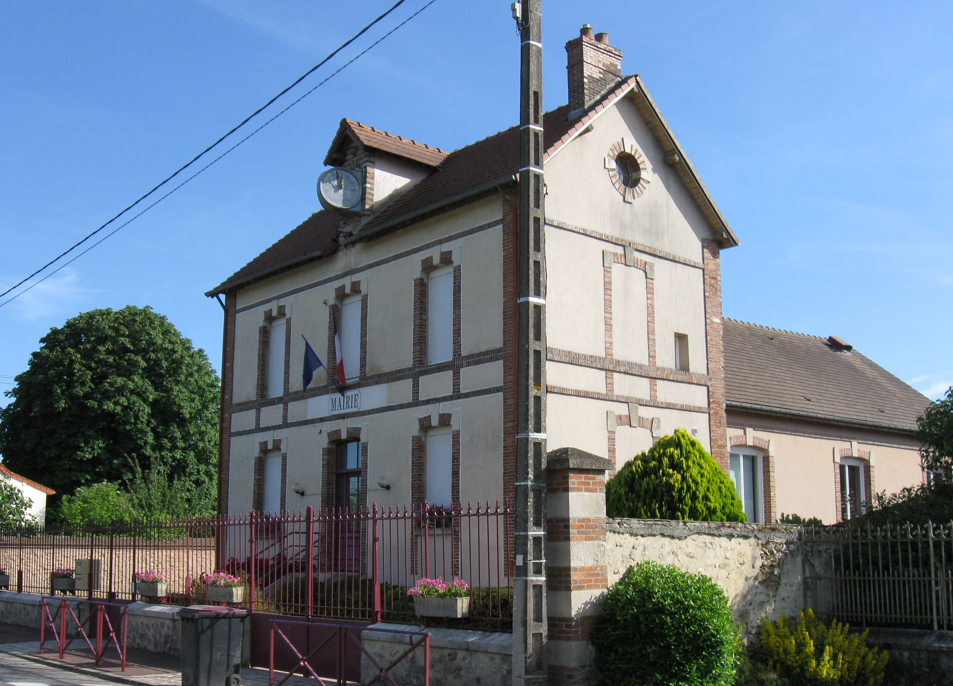 Mairie de Louan-Villegruis-Fontaine. (Seine-et-Marne, région Île-de-France).